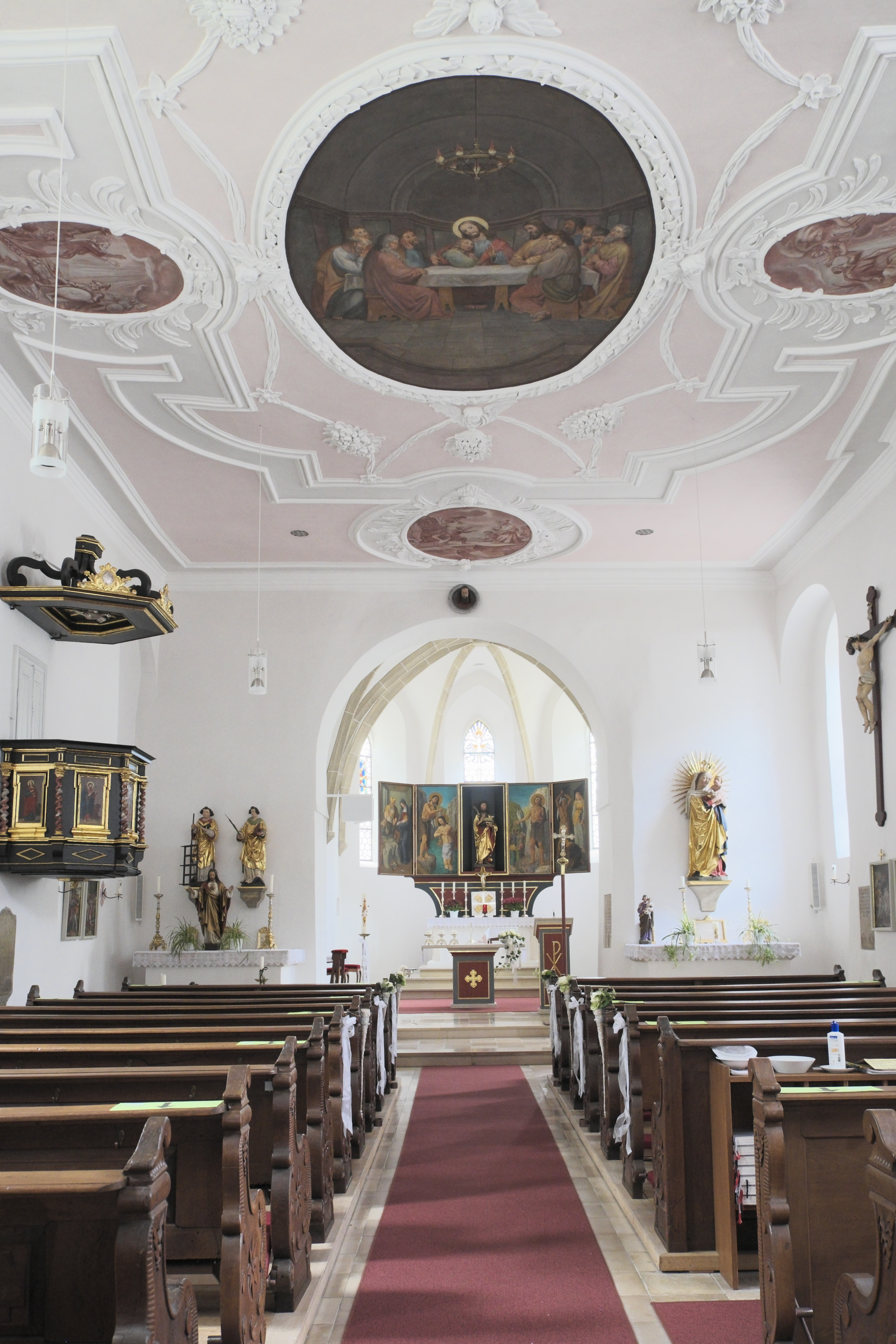 Ehemalige Johanniterkirche, heutige Pfarrkirche St. Johannes in Altmühlmünster (Riedenburg) im niederbayerischen Landkreis Kelheim (Bayern/Deutschland), Innenraum